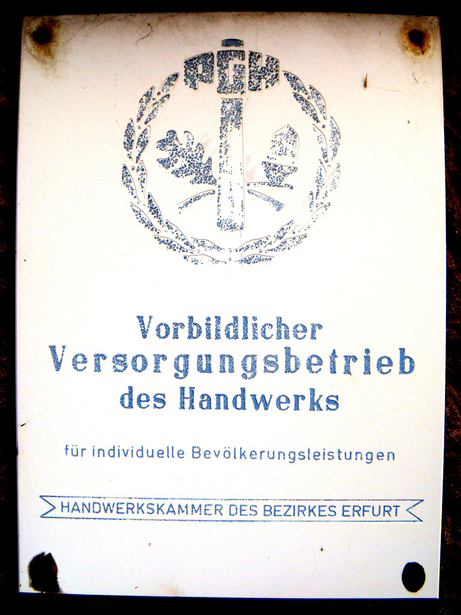 Ehrentafel einer vorbildlichen PGH in Buttstädt